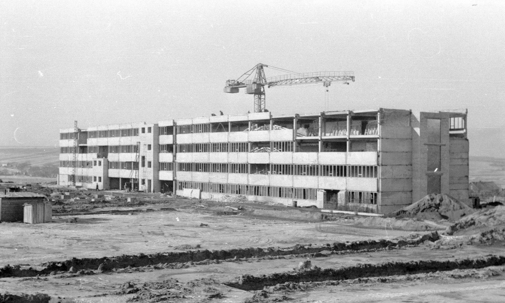 Из истории Скопинского автоагрегатного завода